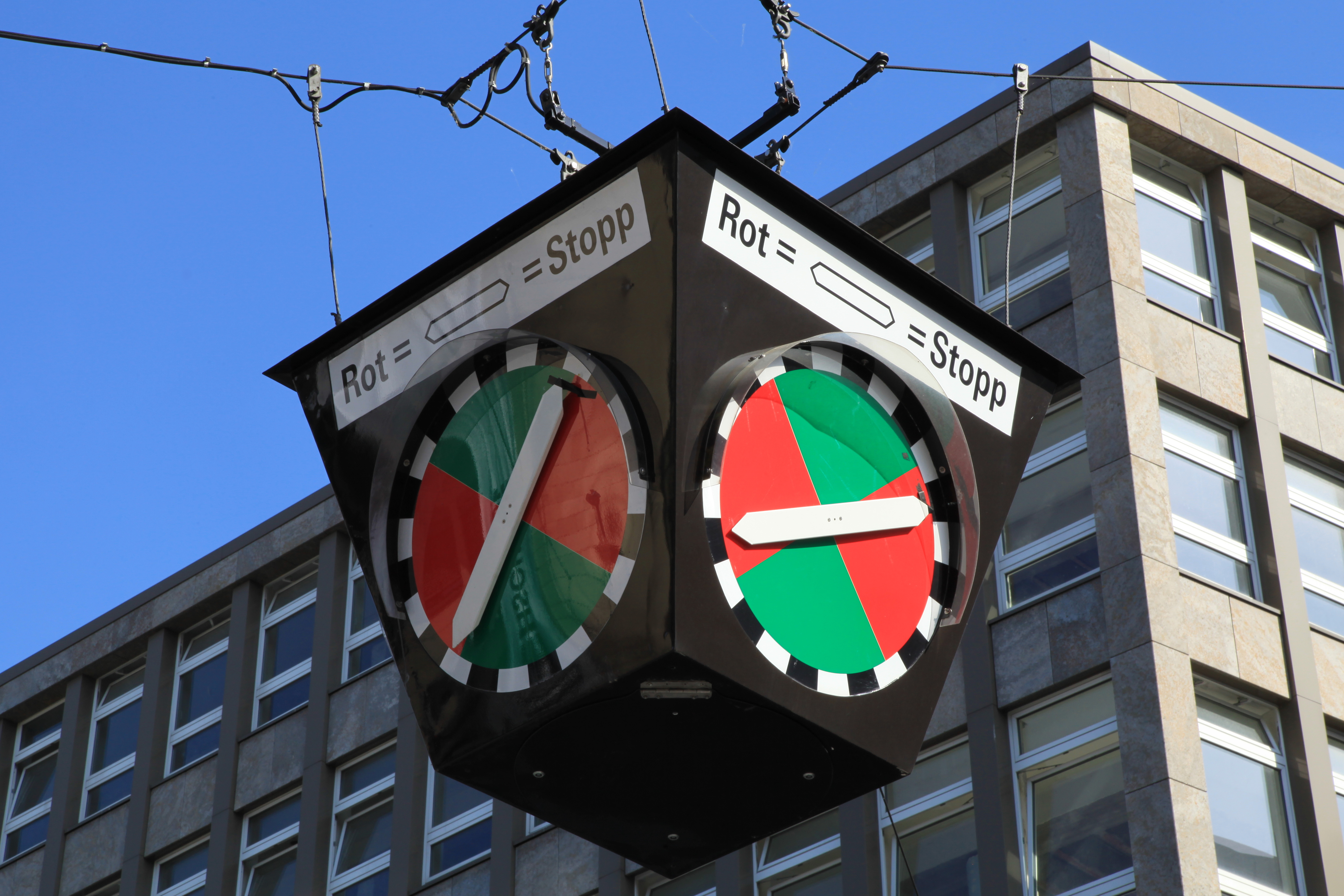 Heuerampel über der Kreuzung Bongardstraße / Kortumstraße in Bochum